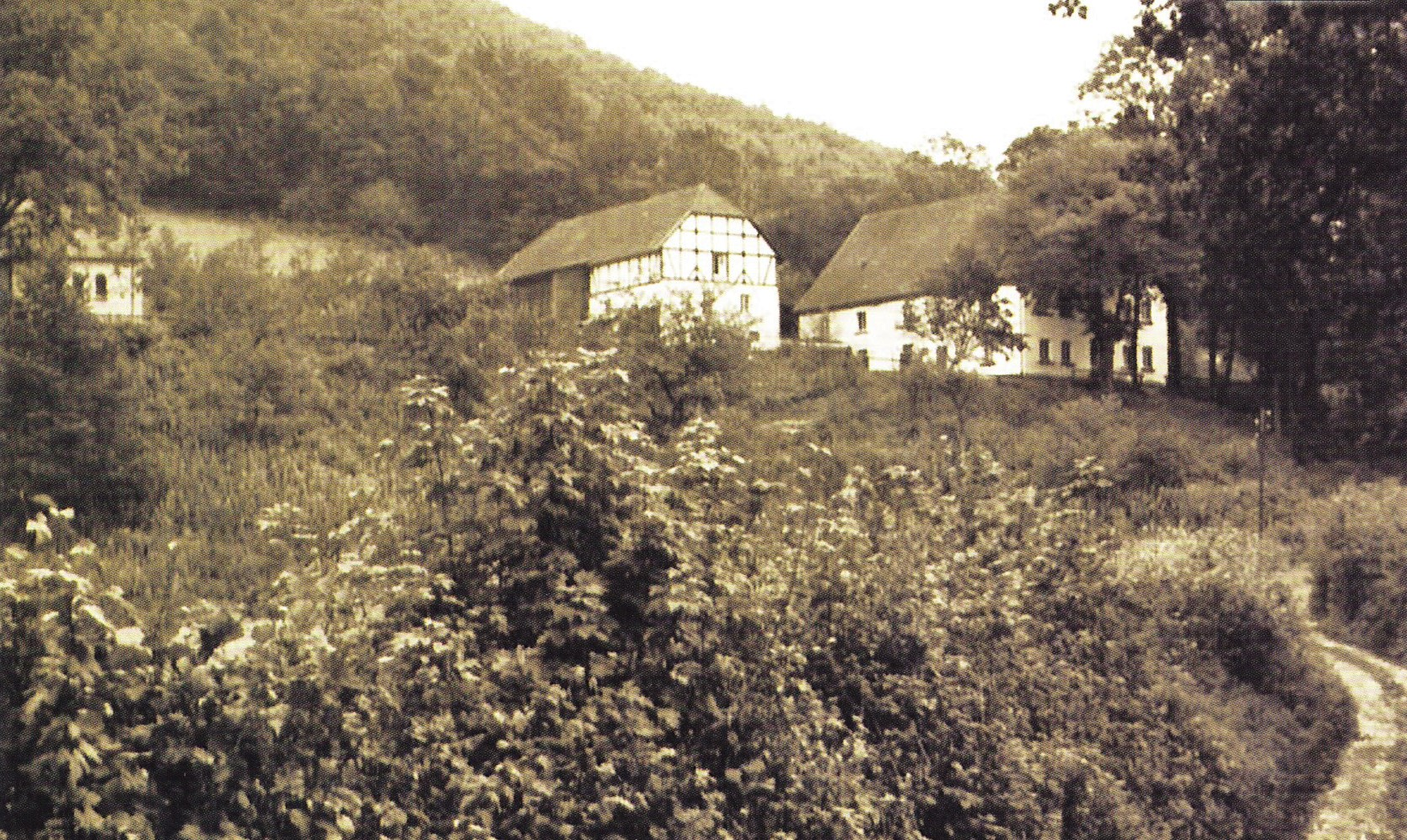 Blick auf den ehemaligen Attendorner Wohnplatz Ackerschott, der dem Bau der Biggetalsperre (1956–1965) weichen musste. Foto mit dem Hof Kühn, links die Marienkapelle. Postkartenfoto um 1960. Text: „Der Ort wird erstmals 1396 in einer Lehnsurkunde erwähnt. Im 15. Jh. wird das Kloster Ewig Besitzer des Hofes und bleibt es bis zur Säkularisierung im Jahre 1803. Nach einem Brand zwischen 1830 und 1840 wird der Hof geteilt. Ein Teil wurde bereits 1940, der andere Teil 1959 an den Ruhrtalsperrenverein verkauft.“ Foto: Pastor Wilfried Müller